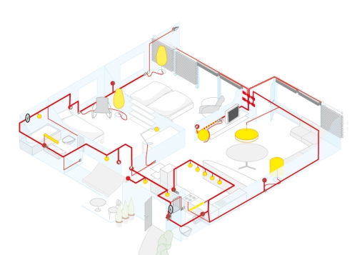 Im modernen Eigenheim sind die einzelnen Verbraucher und Systeme miteinander verbunden und bilden zusammen ein leistungsfähiges, intelligentes Netzwerk.